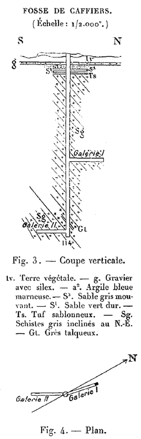 Coupe verticale du puits de Caffiers, Mines du Boulonnais.